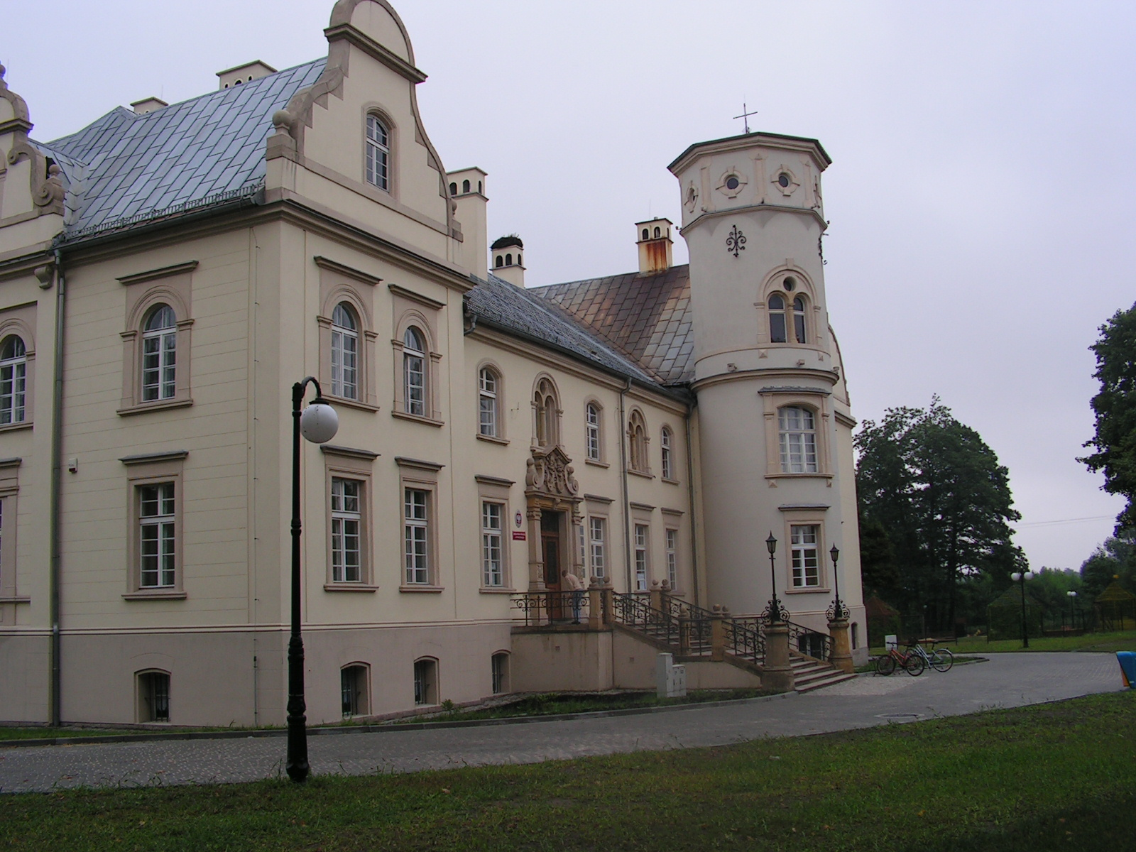 Dwór w Przyszowicach, Fot. Artur Wójtowicz Manor in Przyszowice, phot. Artur Wójtowicz